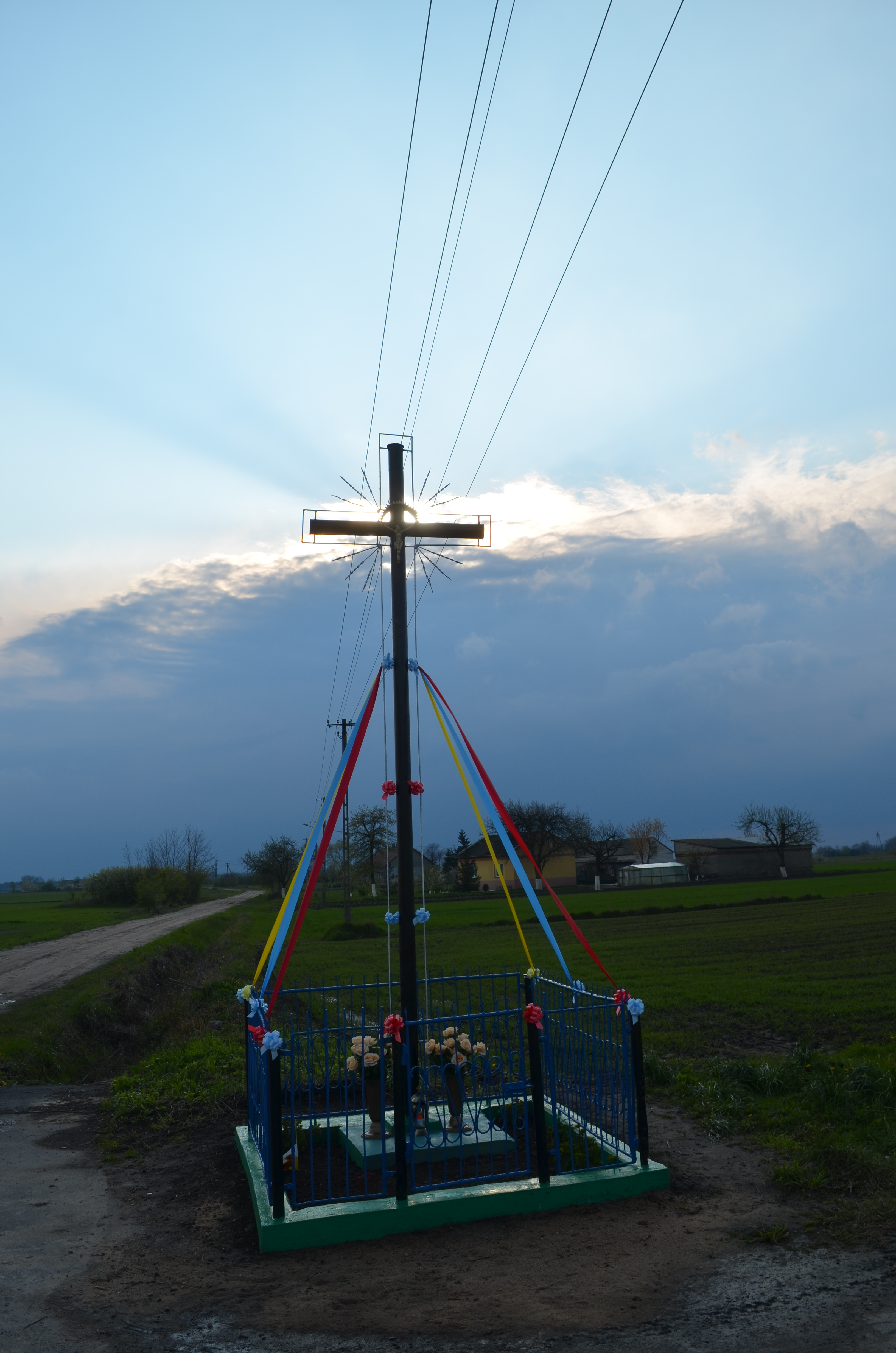 Przydrożny krzyż w miejscowości Zgoda, w gminie Łanięta